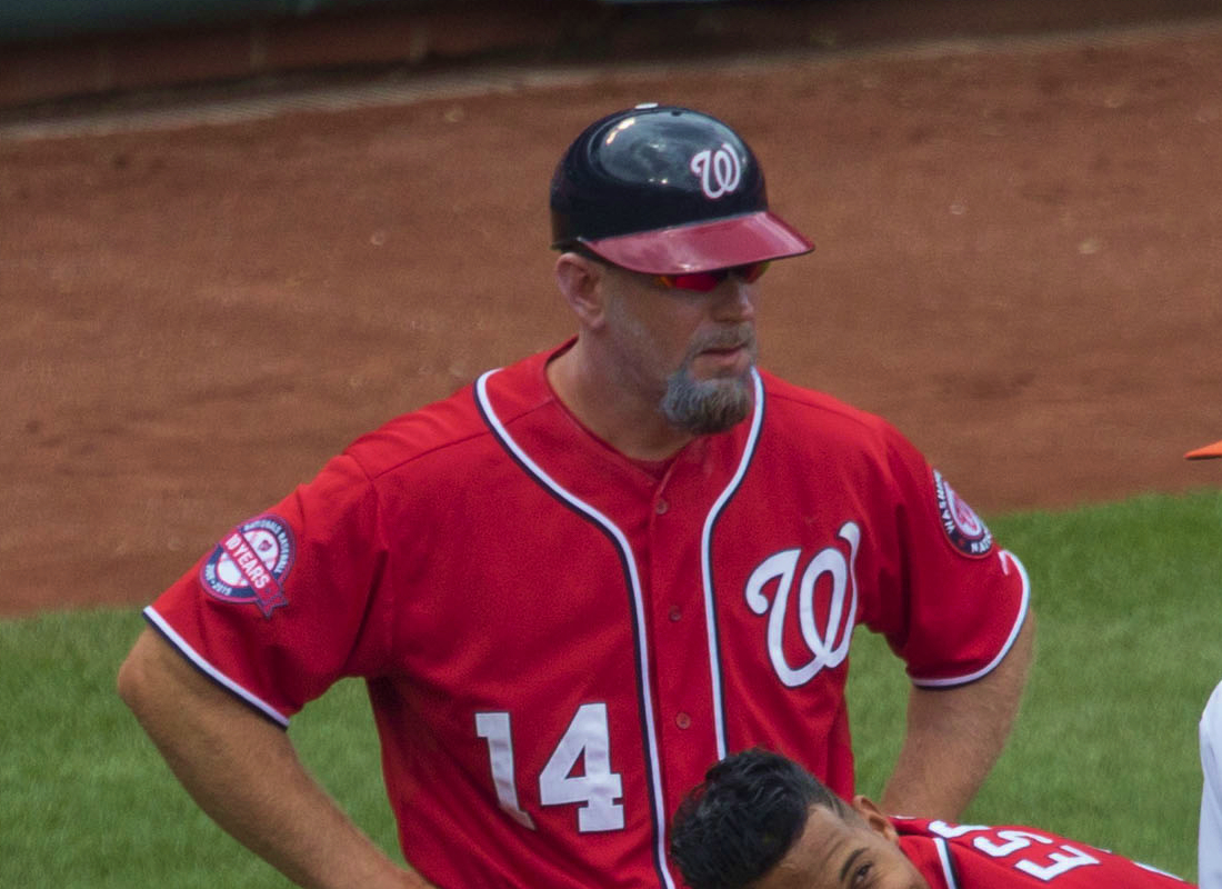 Bob Henley